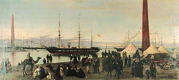 El lienzo representa el paso de la fragata española Berenguela, que fue botada en 1854, por el Canal de Suez tras la inauguración del mismo en 1869.